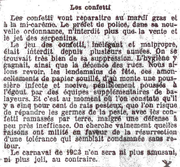 Article du journal français Le Temps à propos des confetti autorisés au Carnaval de Paris 1922.